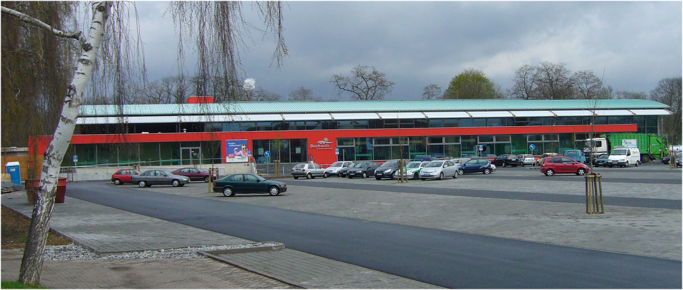 Freizeitbad Deichwelle